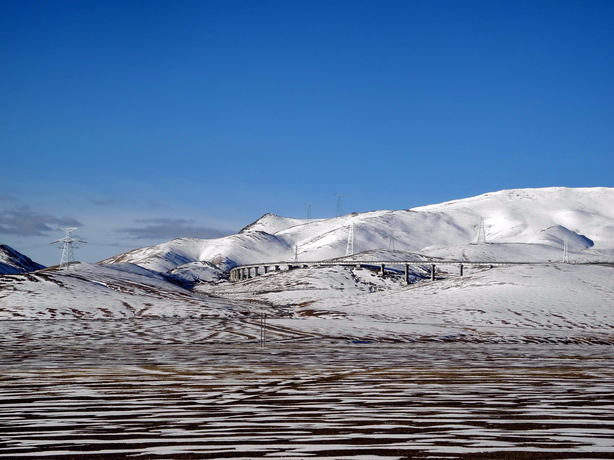 Train Pékin-Lhassa : montée sur les hauts-plateaux àprès Golmud